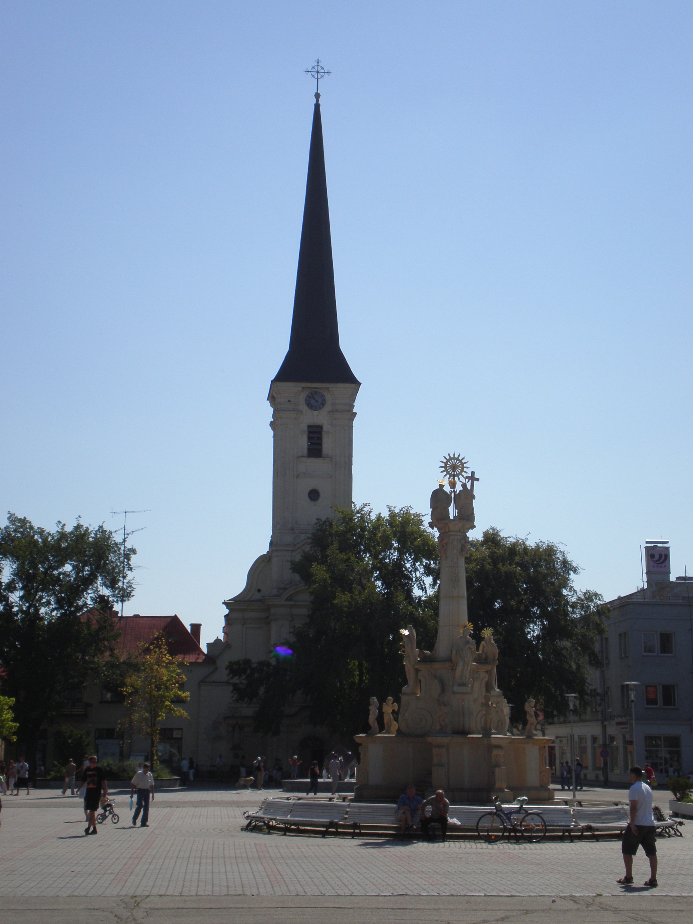 Iglesia parroquial de Érsekújvár